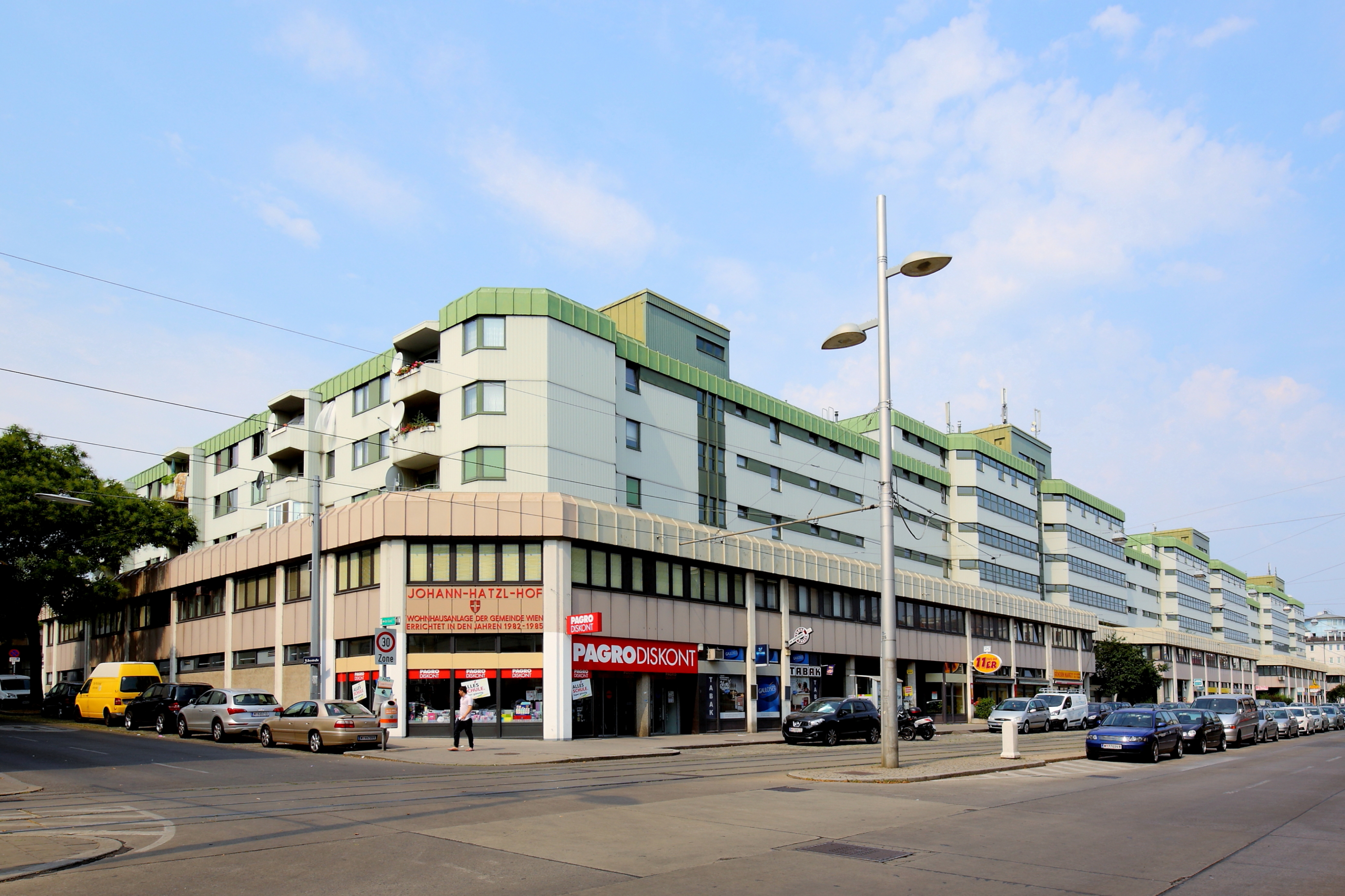 Der Johann-Hatzl-Hof an der Adresse Simmeringer Hauptstraße 34-40 im 11. Wiener Gemeindebezirk Simmering. Die Wohnhausanlage der Gemeinde Wien mit 422 Wohneinheiten wurde von 1982 bis 1985 nach Plänen der Architekten Norbert Kotz, Josef Kohlseisen, Ernst Ströher, Emma Berg, Peter Gebhart und Gerd Neversal errichtet und ist nach dem sozialdemokratischen Politiker Johann Hatzl (1942–2011) benannt.